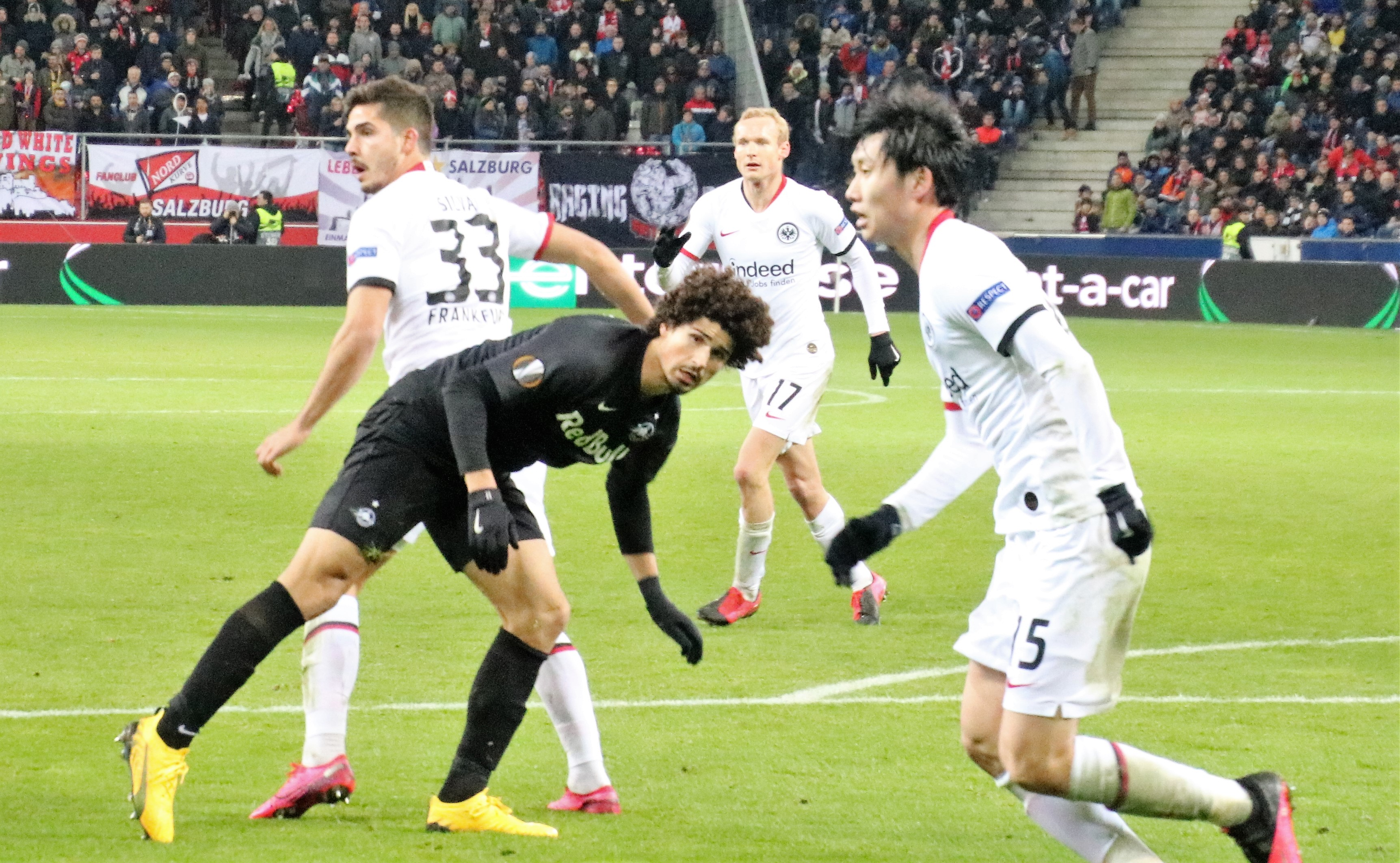 EL Sechzehntelfinale Rückspiel 2:2